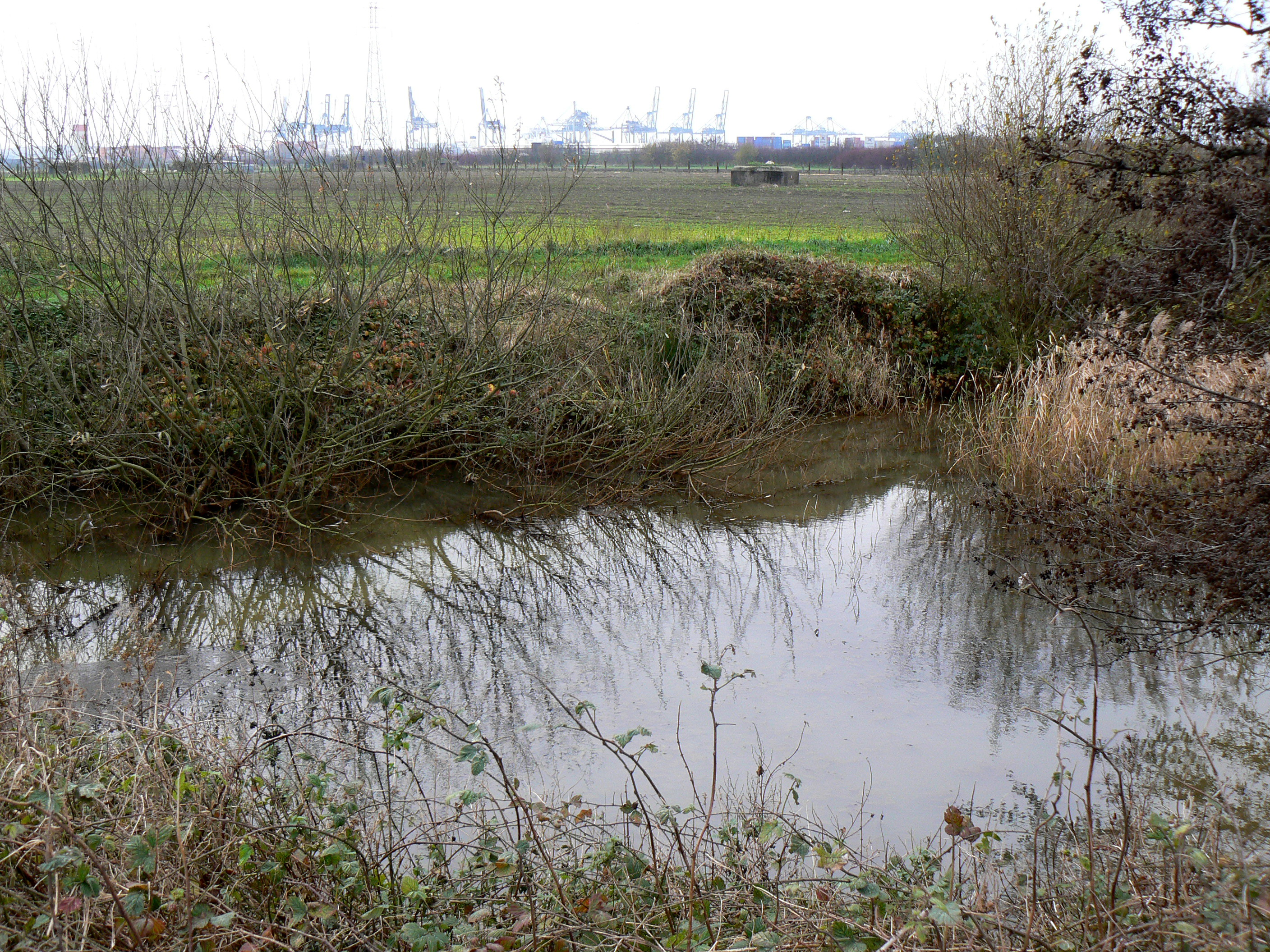 Antitankgracht, Berendrecht (Belgium)